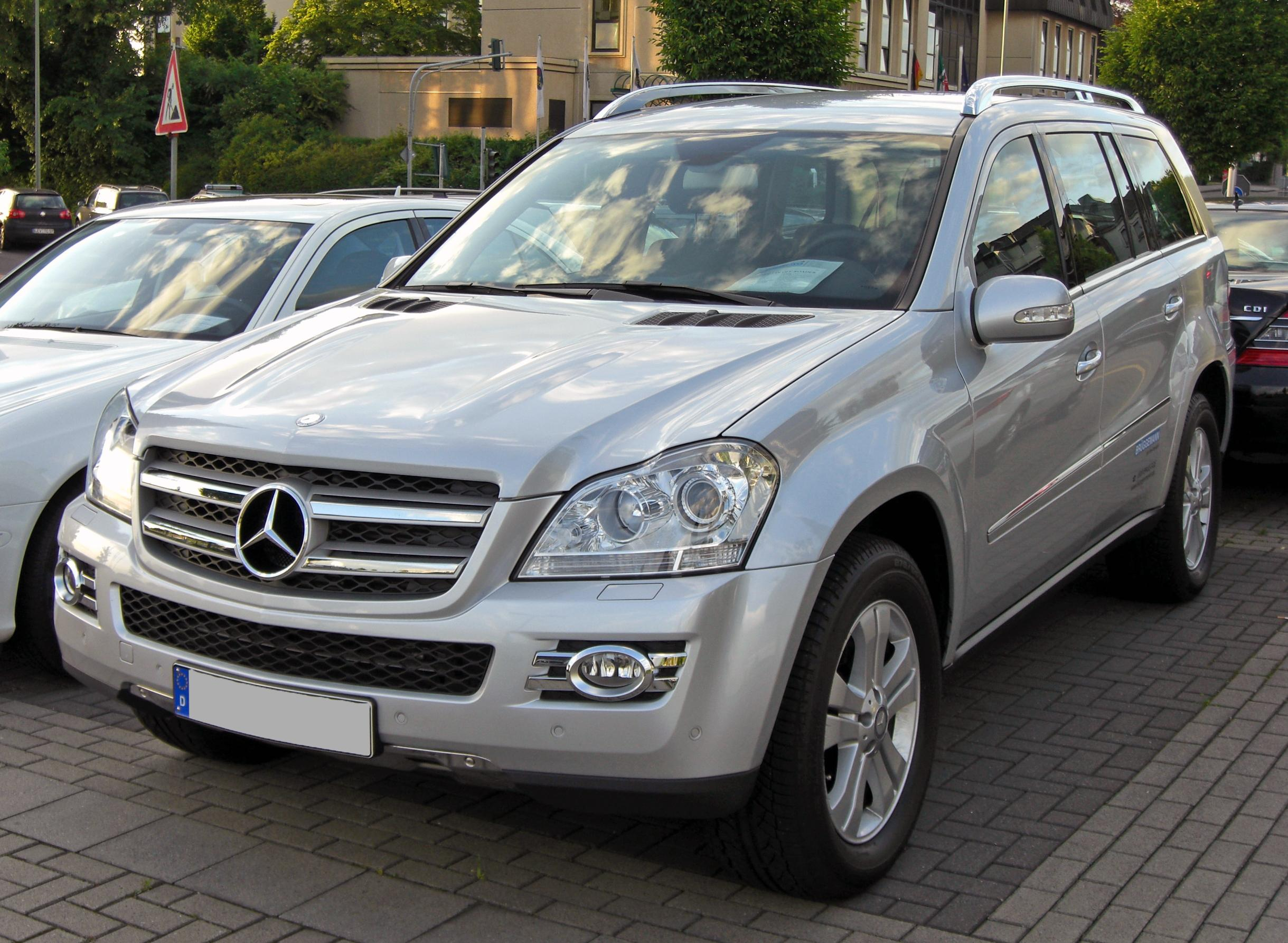 Mercedes GL